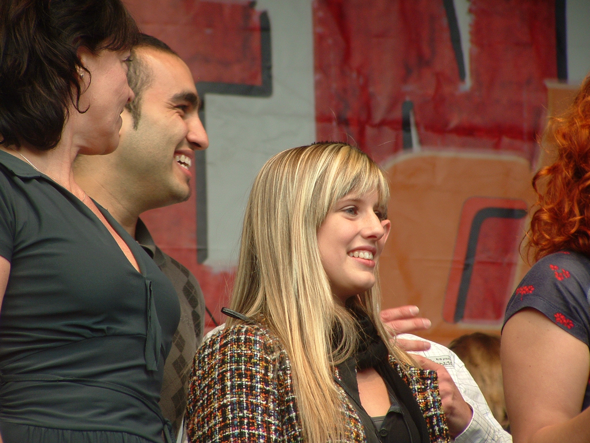 Margot De Ridder tijdens Flikkendag 2008.